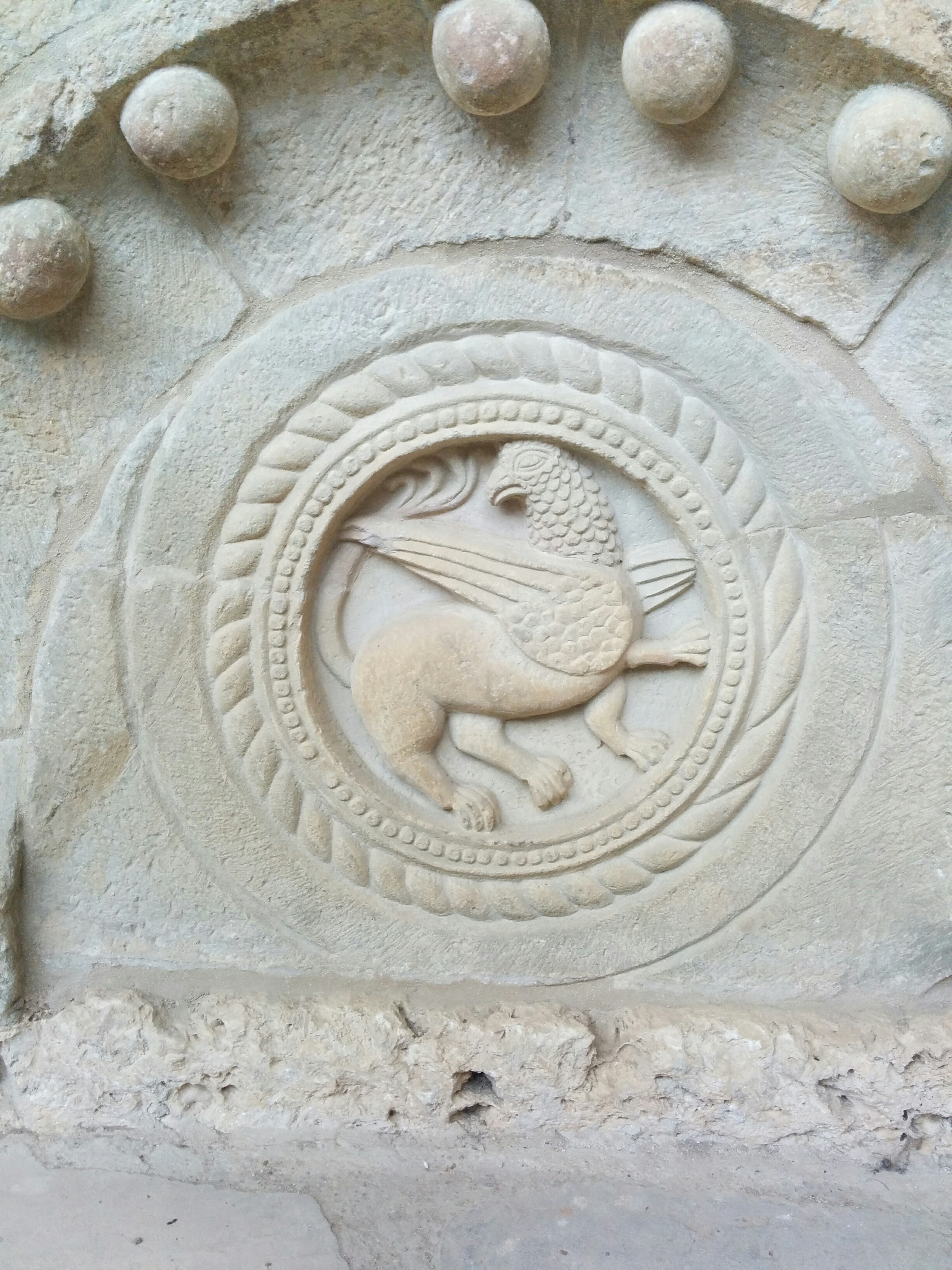 monasterio san juan de la peña